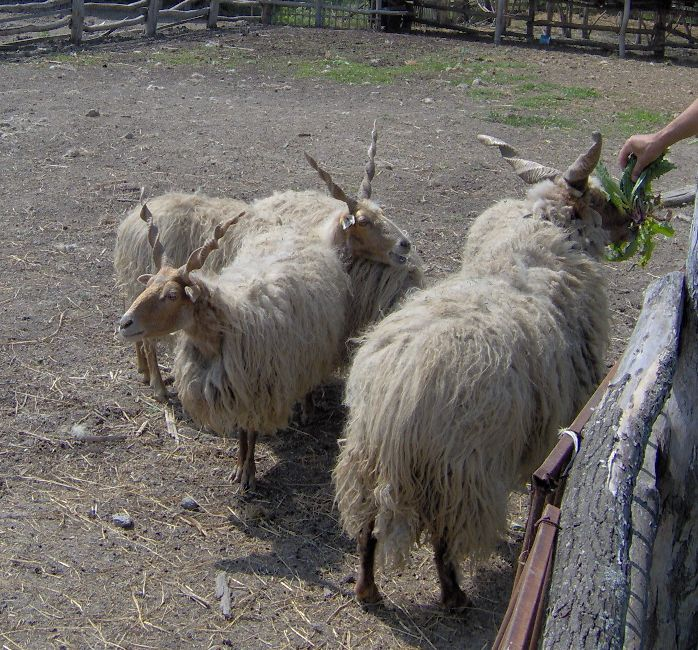 Hungarian racka sheep